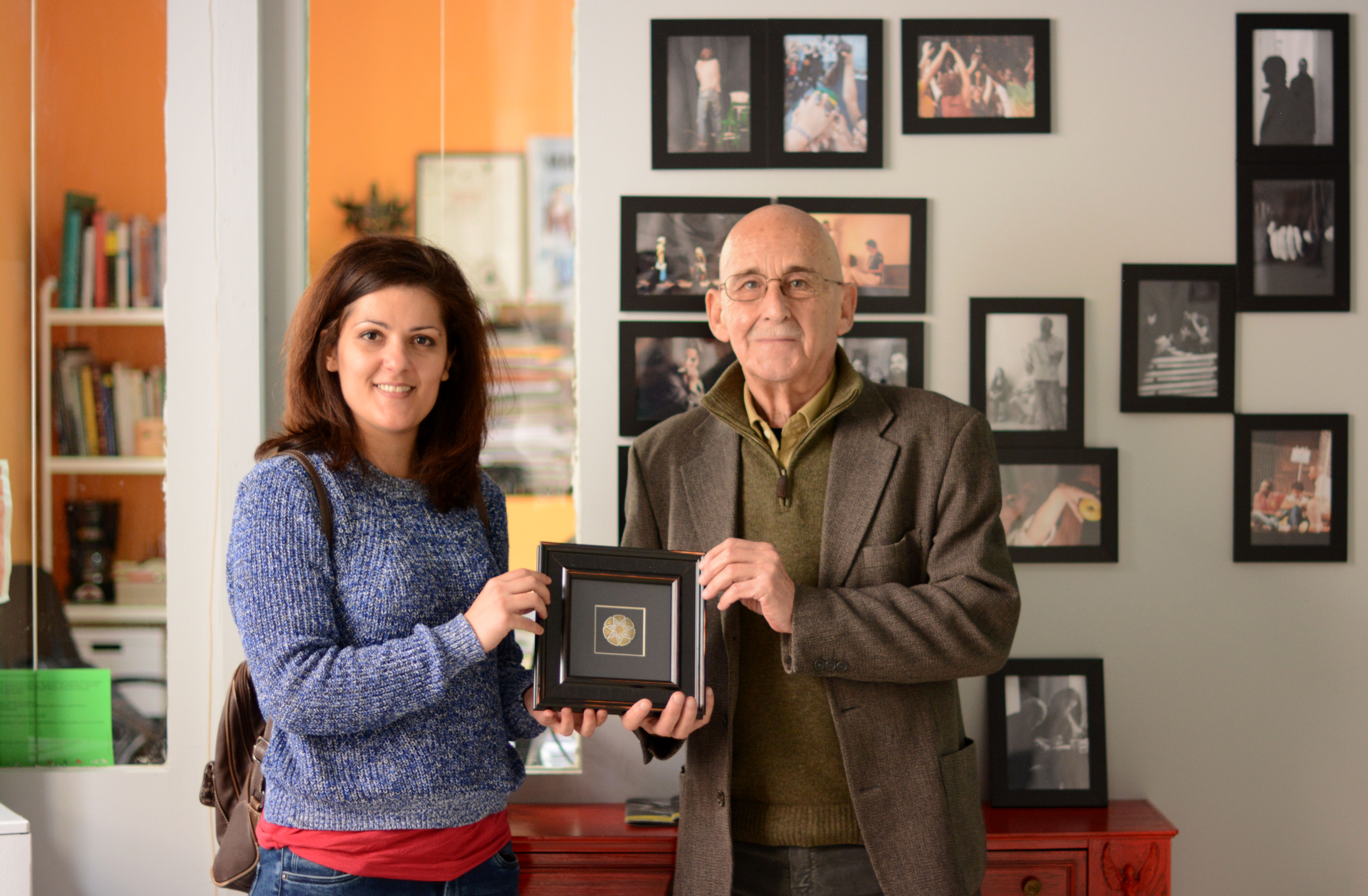 La Federación Española de Teatro Universitario otorga el premio a D. José Sanchis Sinisterra en reconocimiento a toda una carrera dedicada a la investigación y la pedagogía teatral.